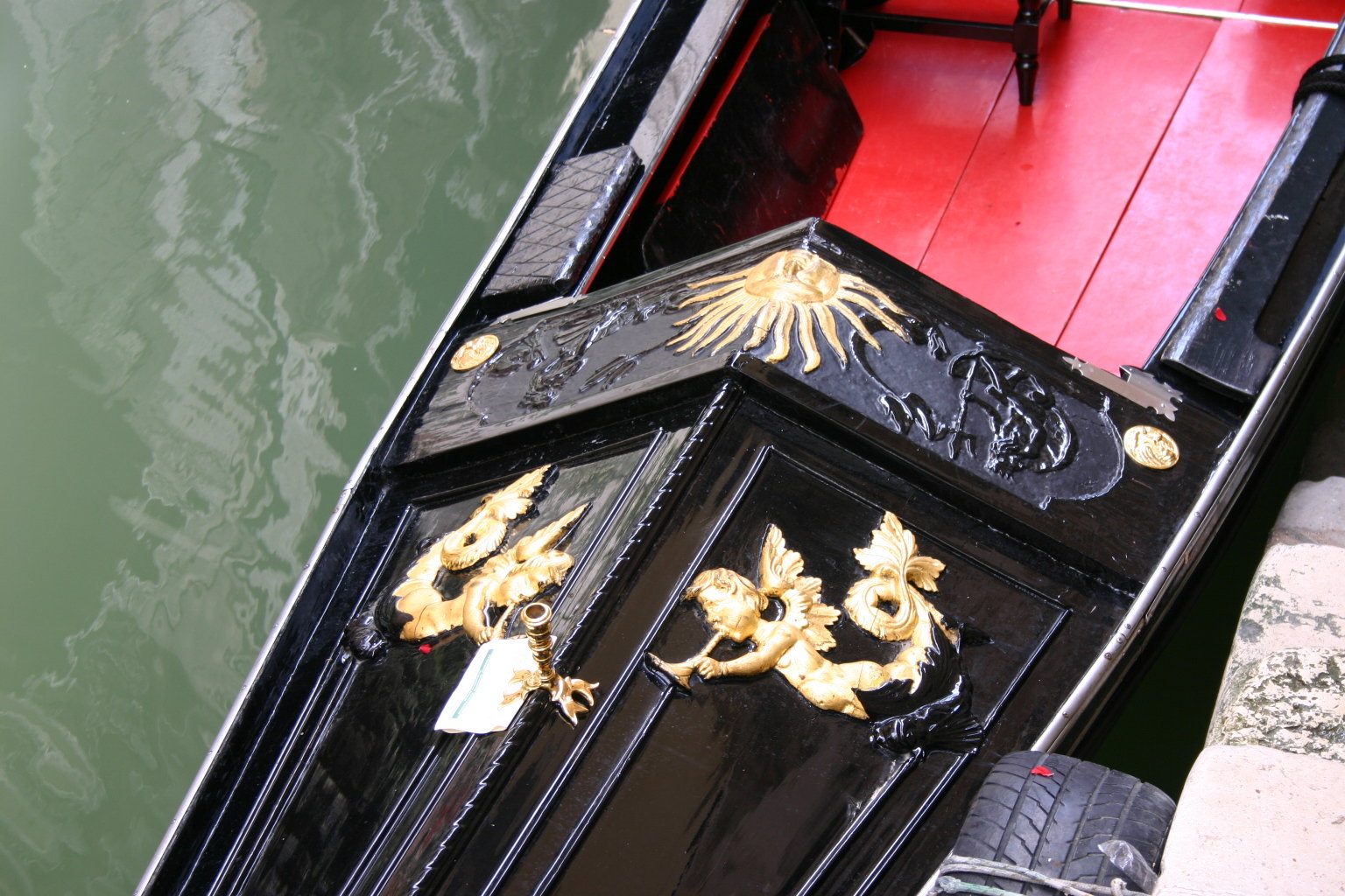 Gondola: fregi dorati. Foto scattata da me a Venezia il 30.6.05. Fotocamera Canon Eos 300D 6.0 mp.